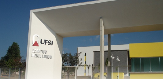 UFSJ campus divinopolis